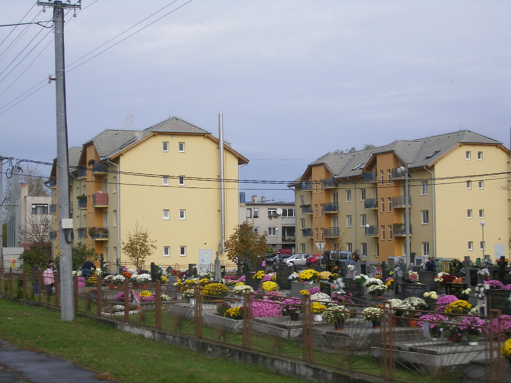 Berencs - temető a Nyitranagyfalui községrészben